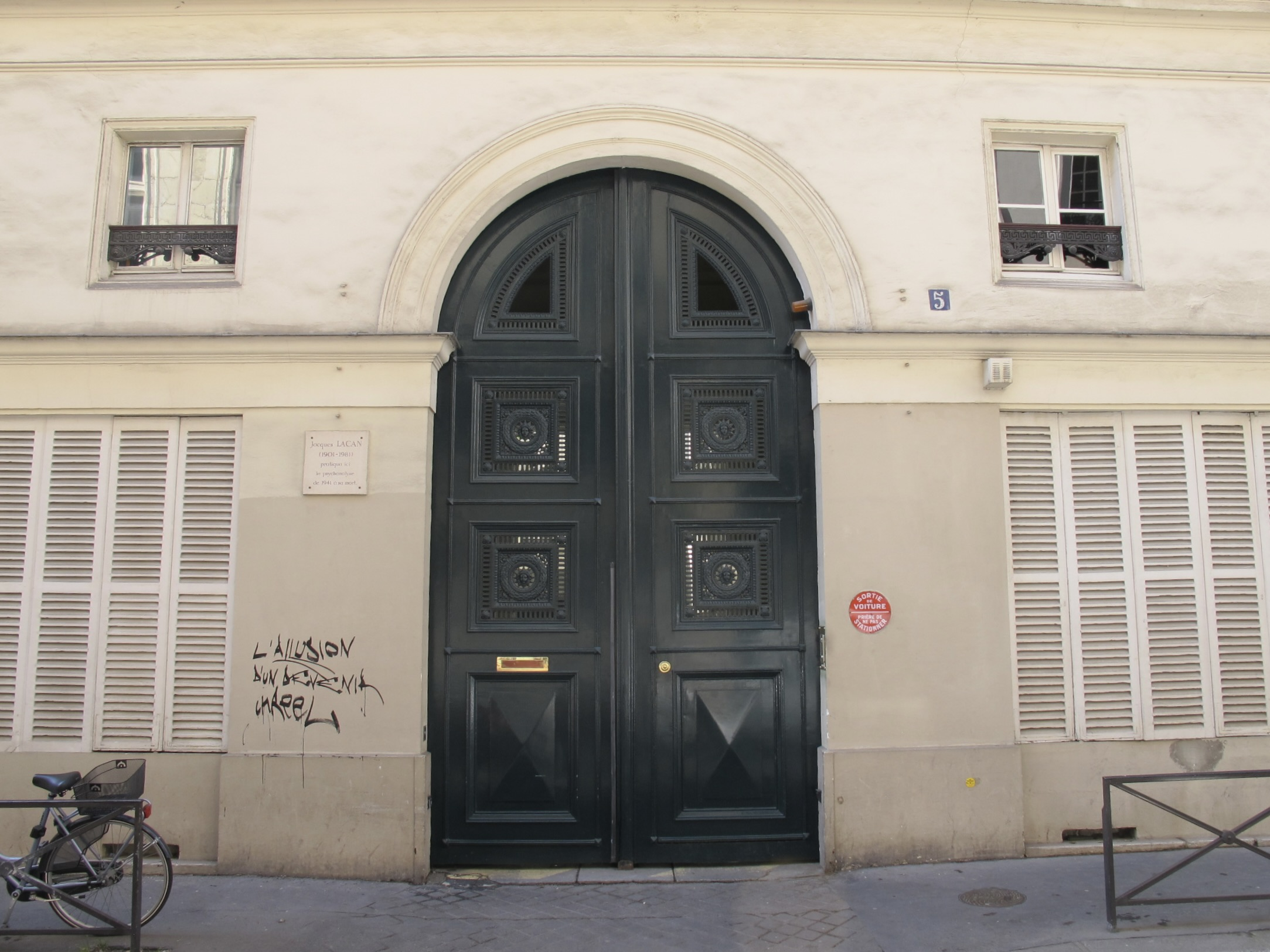 5, rue de Lille, Paris